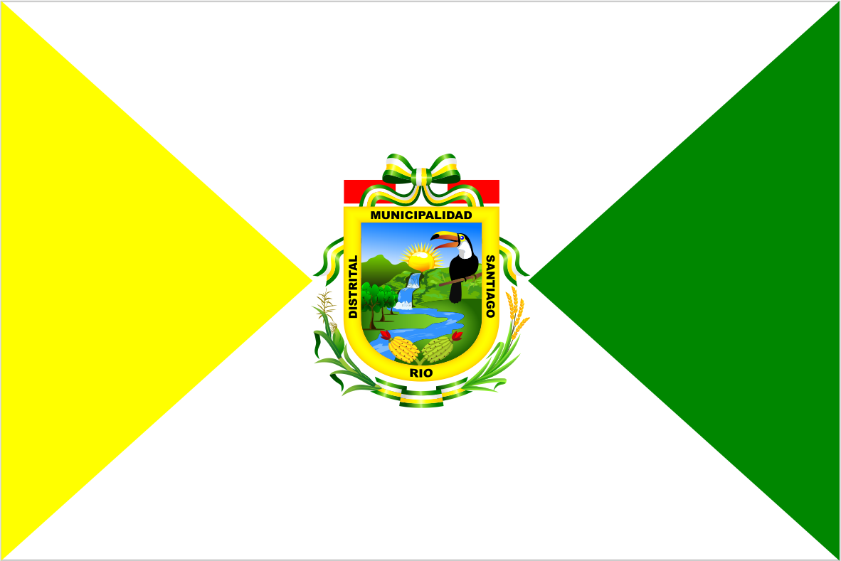 Distrito de Rio Santiago - Provincia de Condorcanqui - Región Amazonas